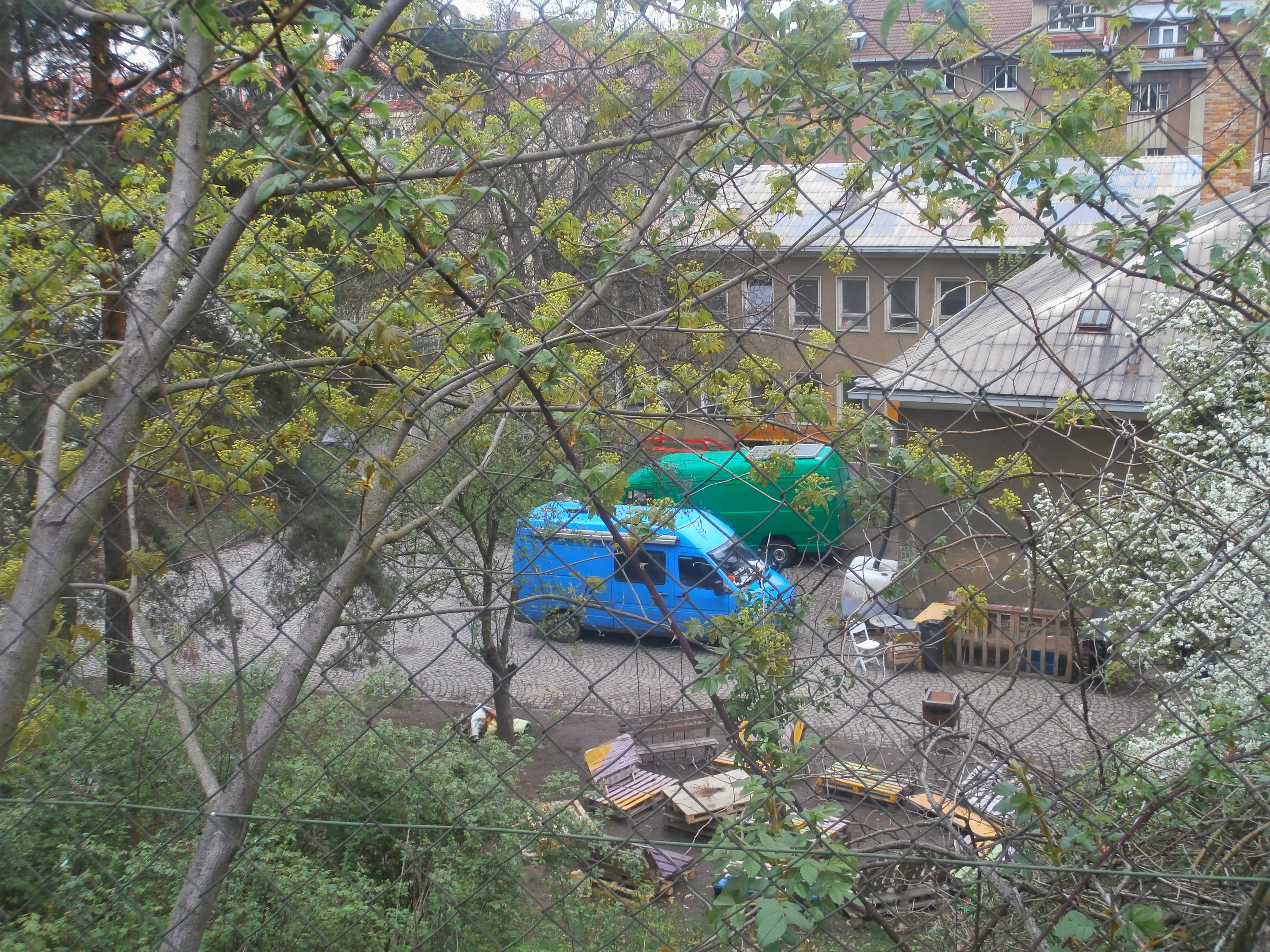 Pohled na Kliniku a její zahradu přes plot, z jihu od ulice Na Parukářce (duben 2016)